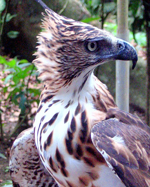 Philippine Hawk-eagle, Nisaetus philippensis